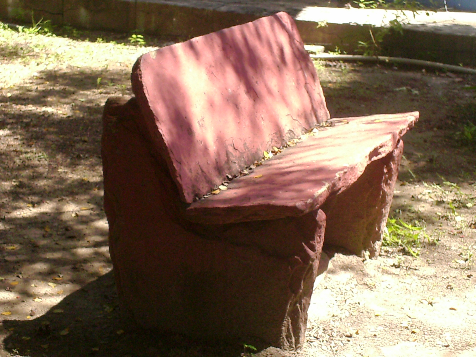 Histórico banco artesanal de pedra do campus da Universidade Estadual do Piauí em Campo Maior.